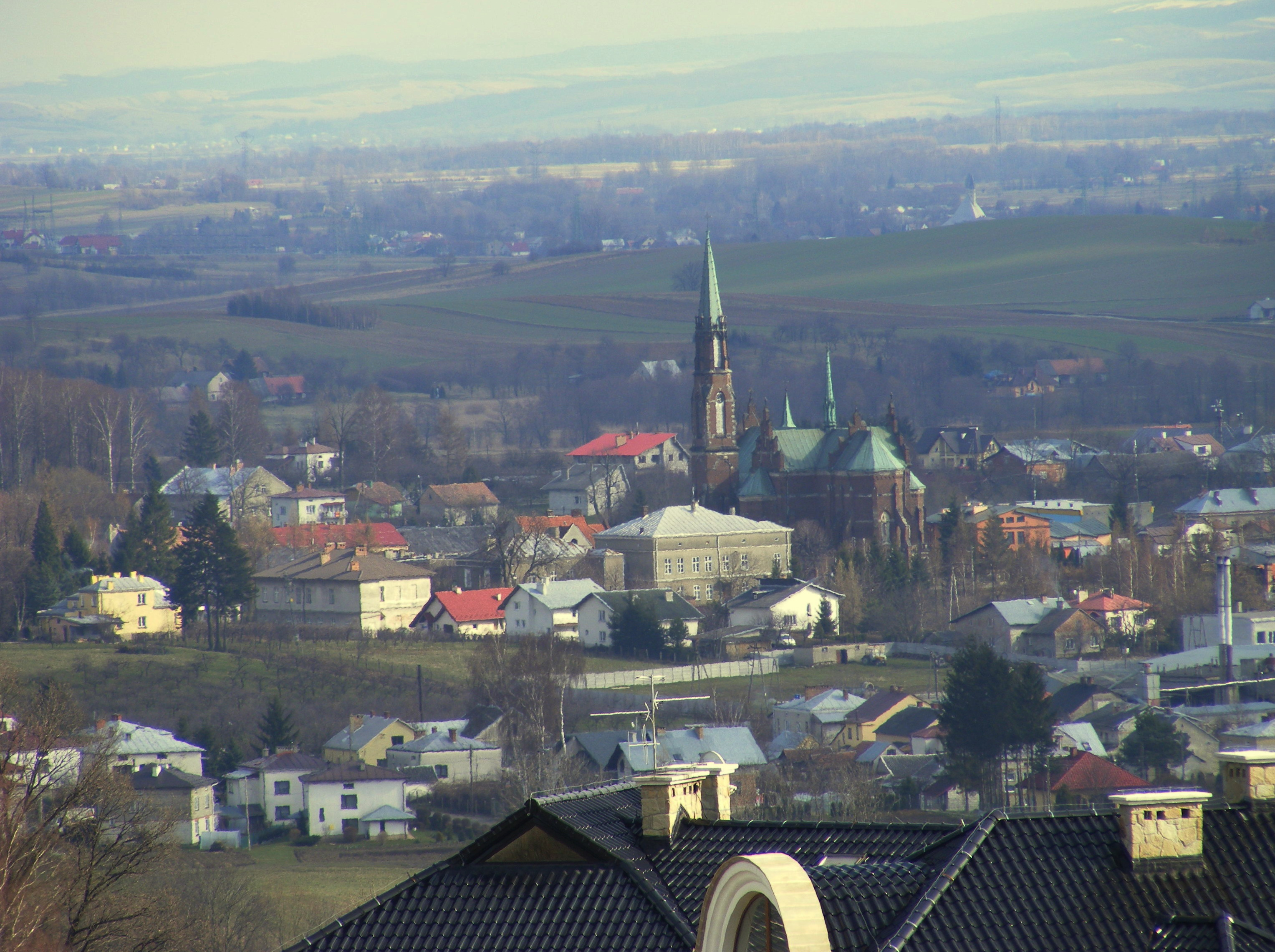 Korczyna widok ze wzgórza